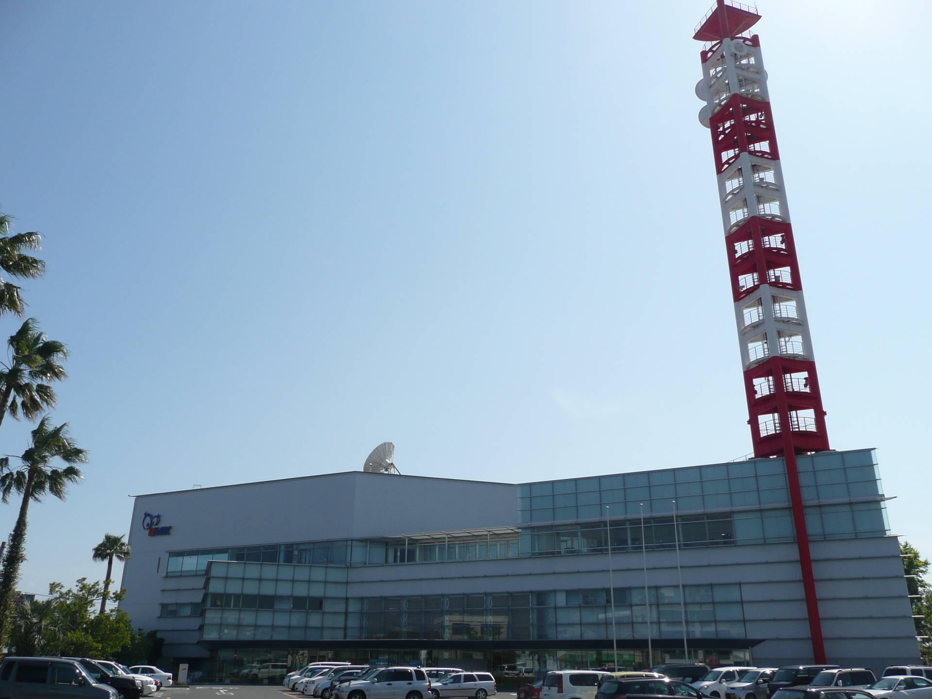 テレビ宮崎（UMK,JODI-TV,JODI-DTV）の演奏所（スタジオ）。初版は2007年4月8日撮影。